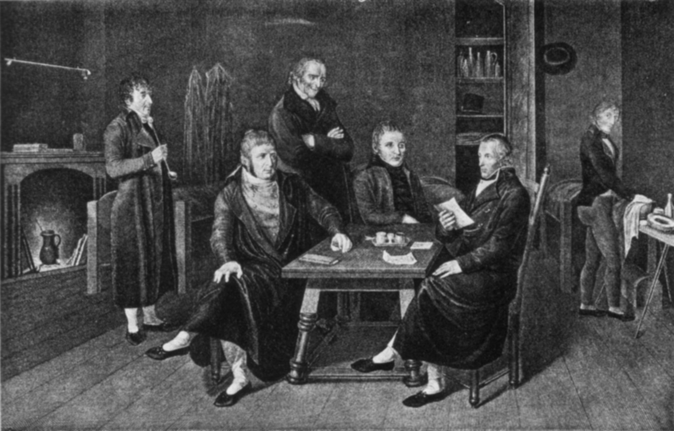 Nach dem Ende der Helvetischen Republik warten prominente Führer der Partei der Föderalisten inhaftiert 1802/03 in der Festung Aarburg auf die Mediation Napoleons. Von links: Jakob Zellweger, Alois Reding, Franz Anton Wyrsch, Ludwig auf der Mauer, Hans Caspar Hirzel sowie der Diener Josef Maria. Kupferstich von Th. Falckeisen nach einem Aquarell von Johannes Pfenninger